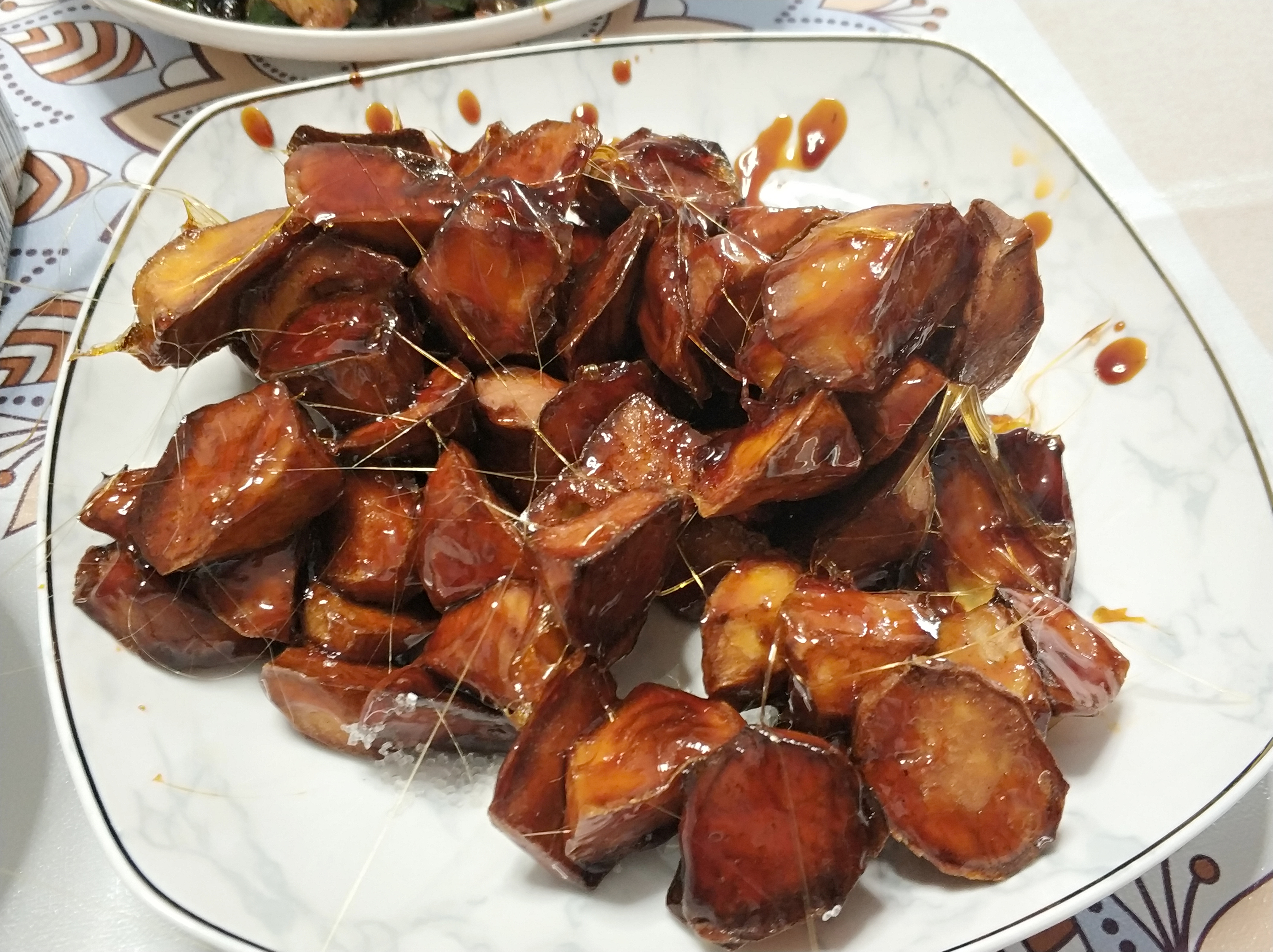 中文（中国大陆）: 地瓜炸后熬糖汁